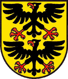 Wappen der politischen Gemeinde Läufelfingen, Schweiz